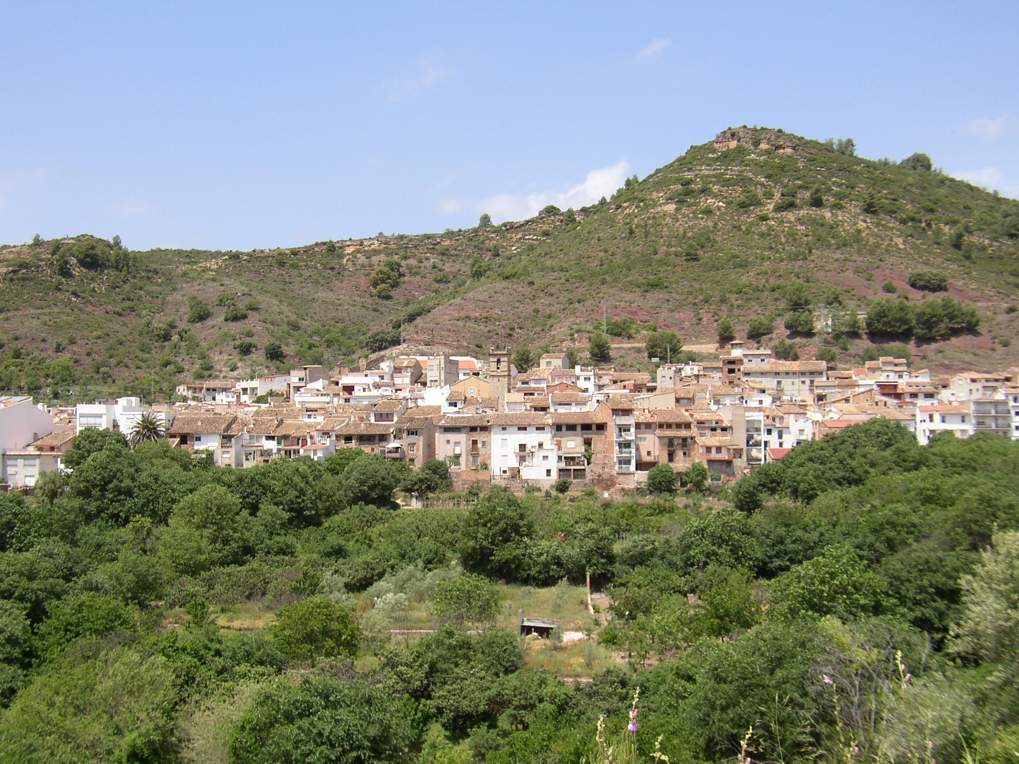 Vista general. Castellón (Comunidad Valenciana) España. Algimia de Almonacid. Vista general. Fotografía realizada el 19 mayo de 2006 por el autor User: Pelayo2